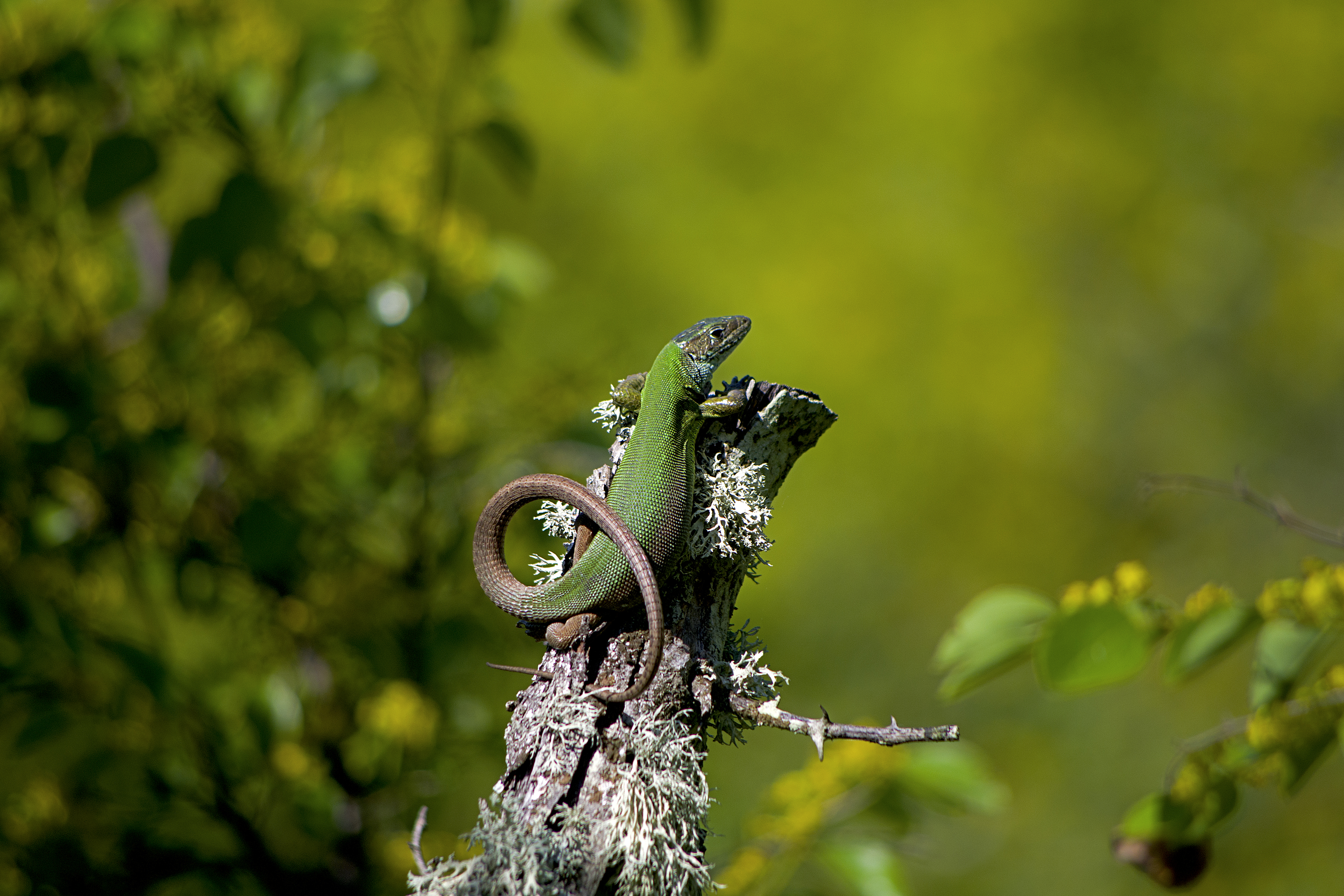 Беглик таш – Ропотамо, Зелен гущер